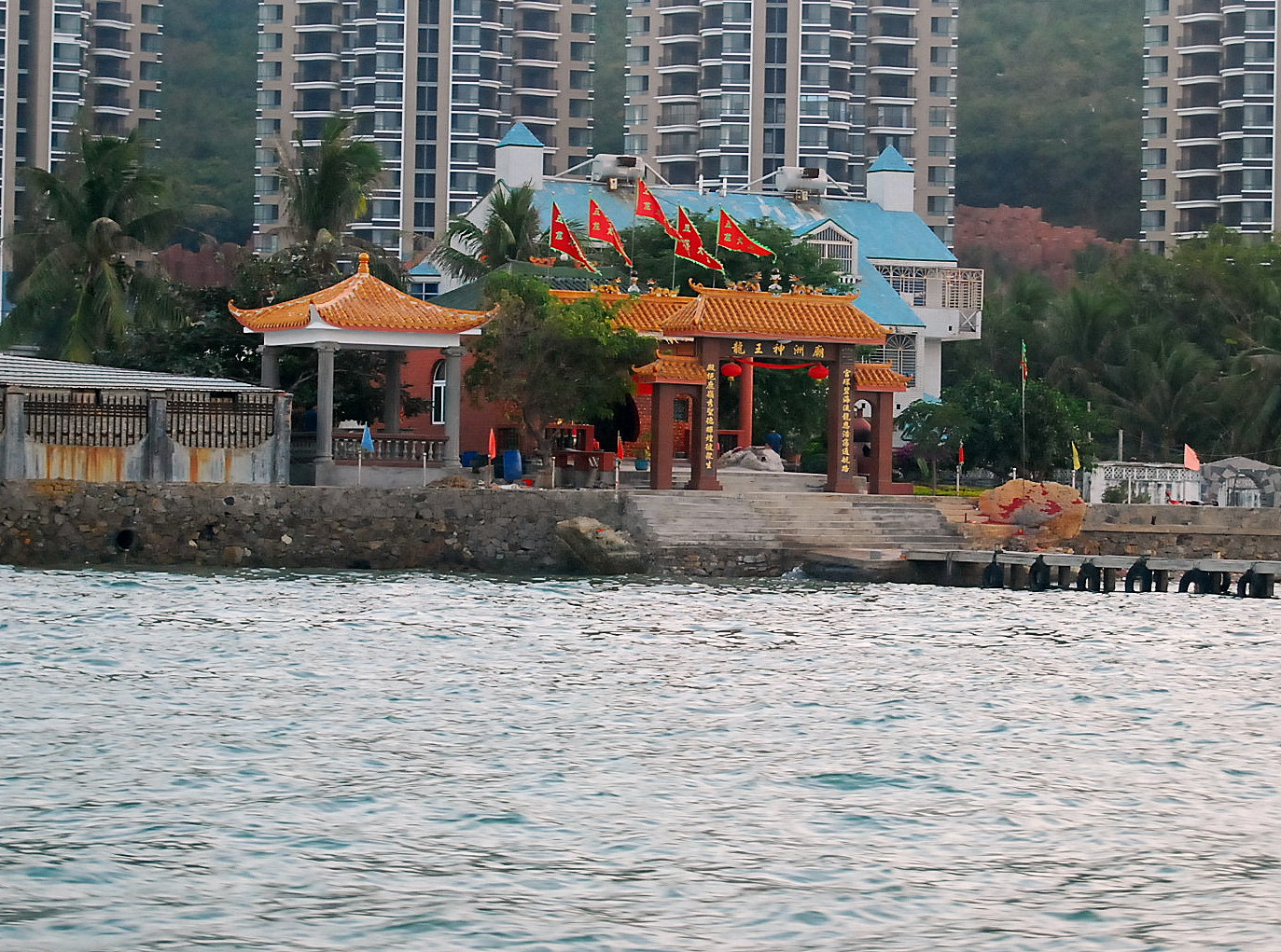 三亚的海上龙王庙